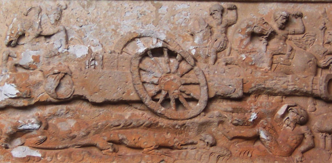 Canon sculpté sur la frise entourant l'église d'Assier.